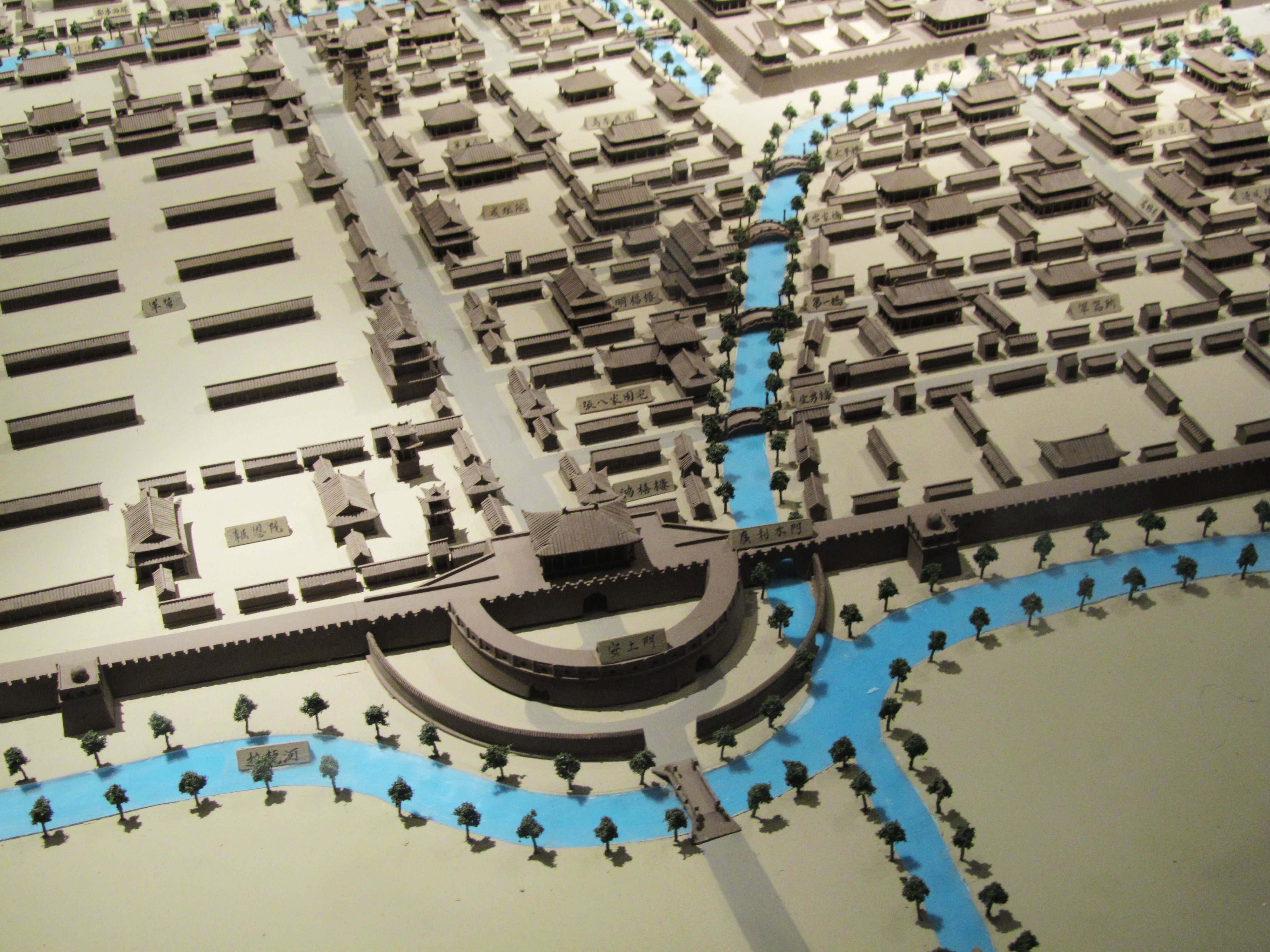 河南博物院内所展示的宋代汴京城模型局部。